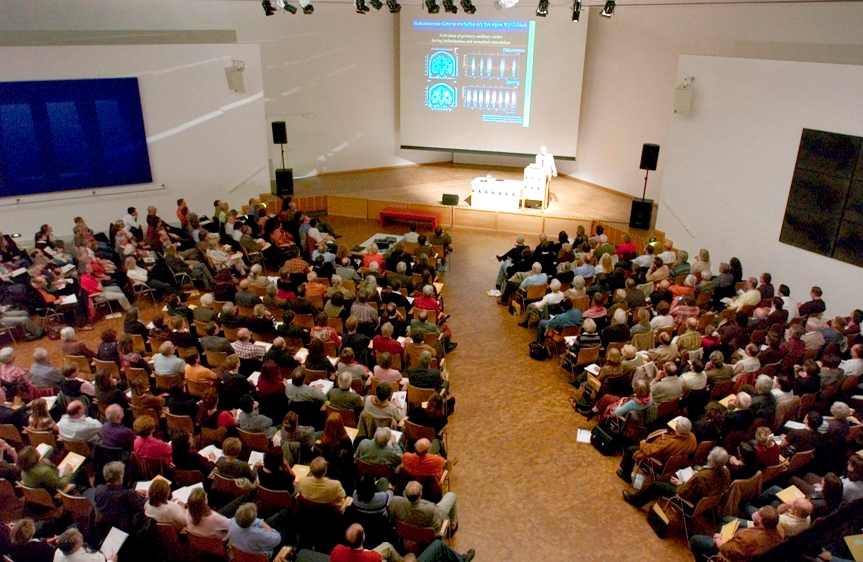 Symposium 2007